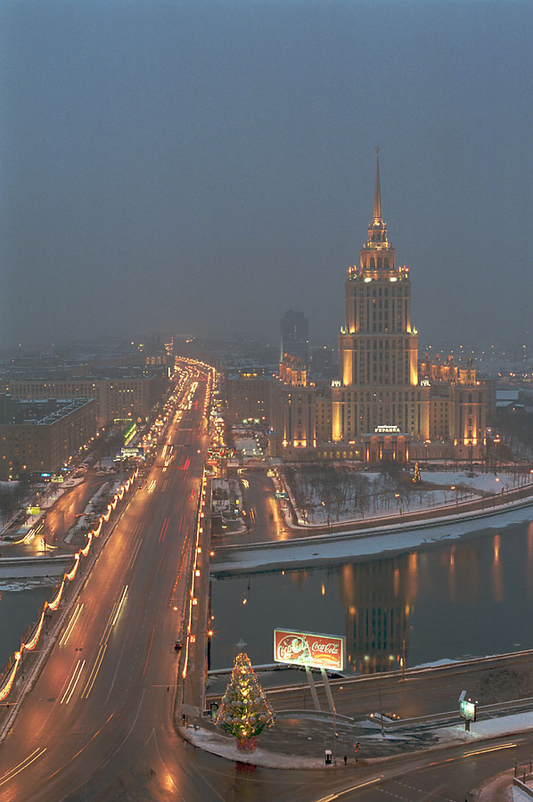 Kutuzovsky prospekt in Moscow at night